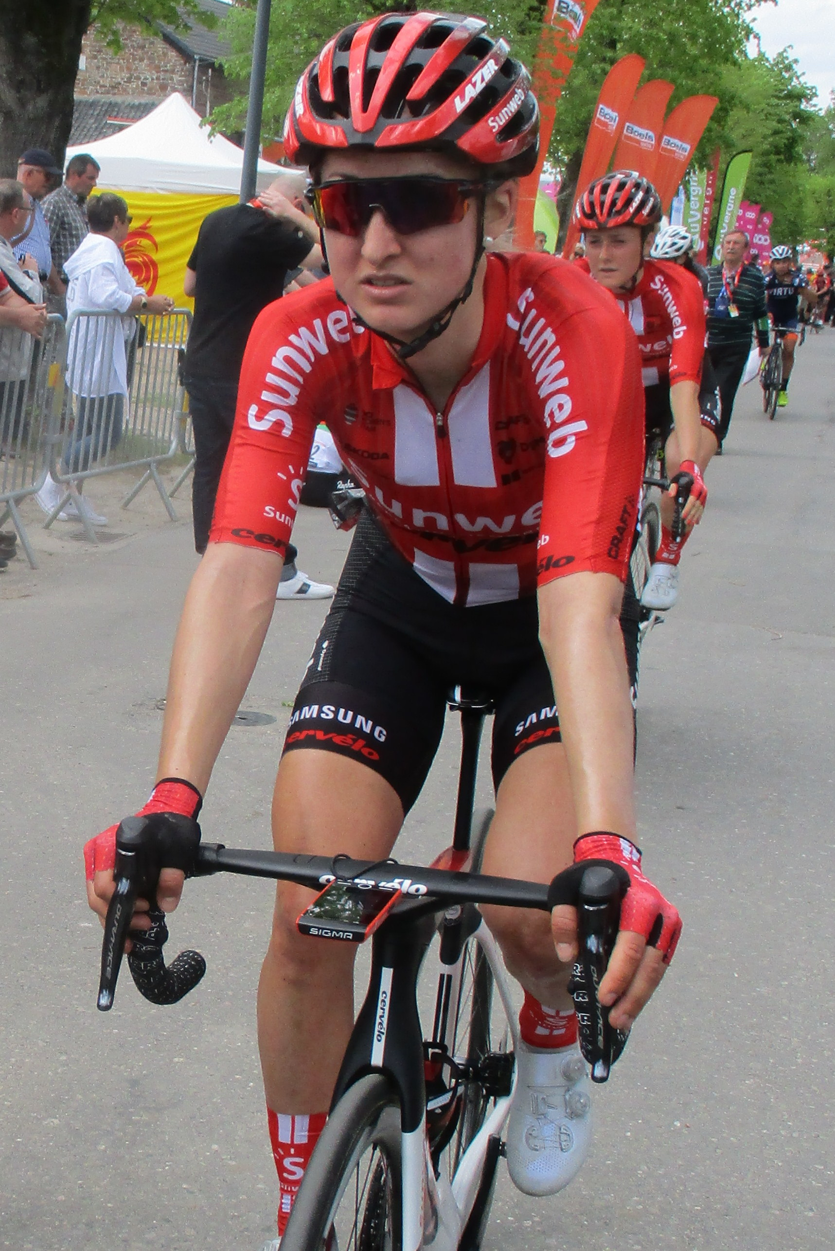 Finish van de Waalse Pijl 2019 voor vrouwen op de Mur de Huy